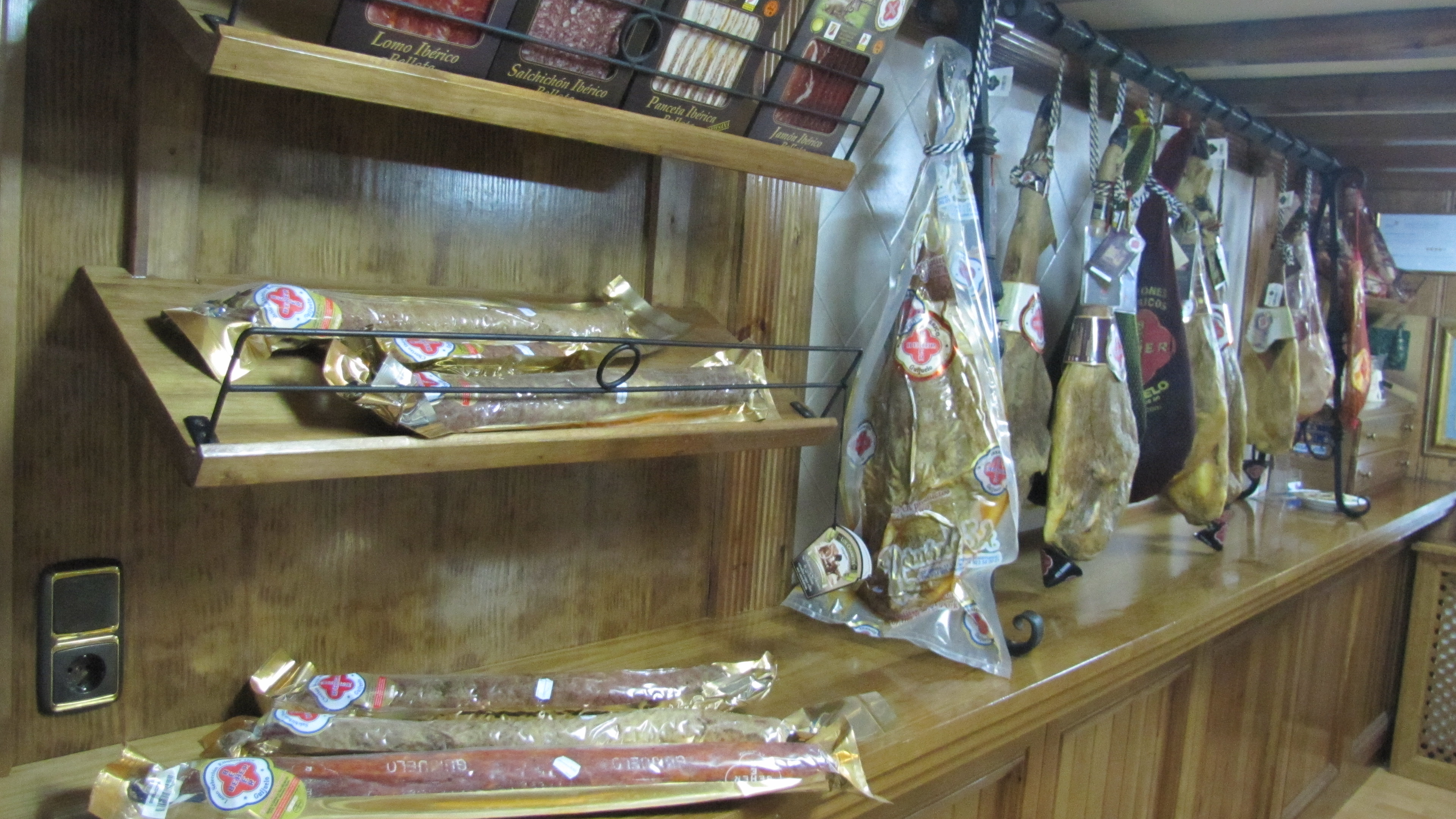 Muestrario de embutidos ibéricos en las instalaciones de BEHER, Bernardo Hernández, en Guijuelo (Salamanca, España). En la foto se puede observar lomo, salchichón, panceta y jamón ibérico envasados, en el estante superior, en el central e inferior, lomo, salchichón y chorizo. Y al fondo, diferentes piezas completas de jamón, bellota y recebo.